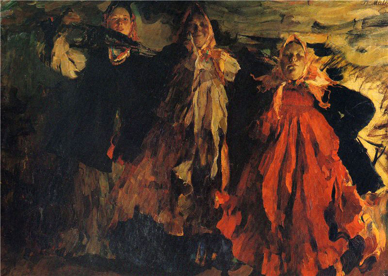 Три бабы 1902 г